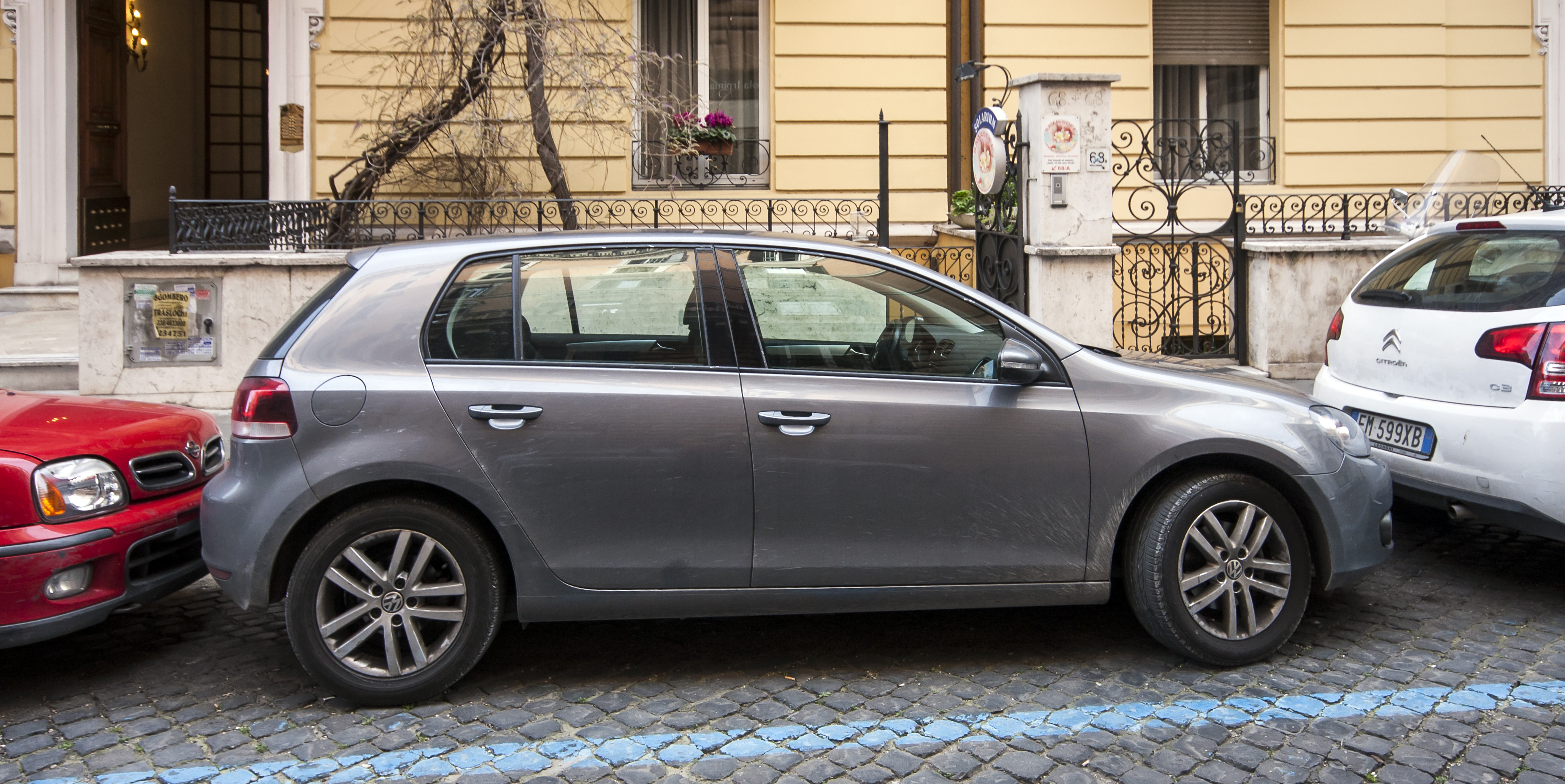 Fickparkerad bil på en gata i Rom, där bilar ofta ställs mycket tätt.